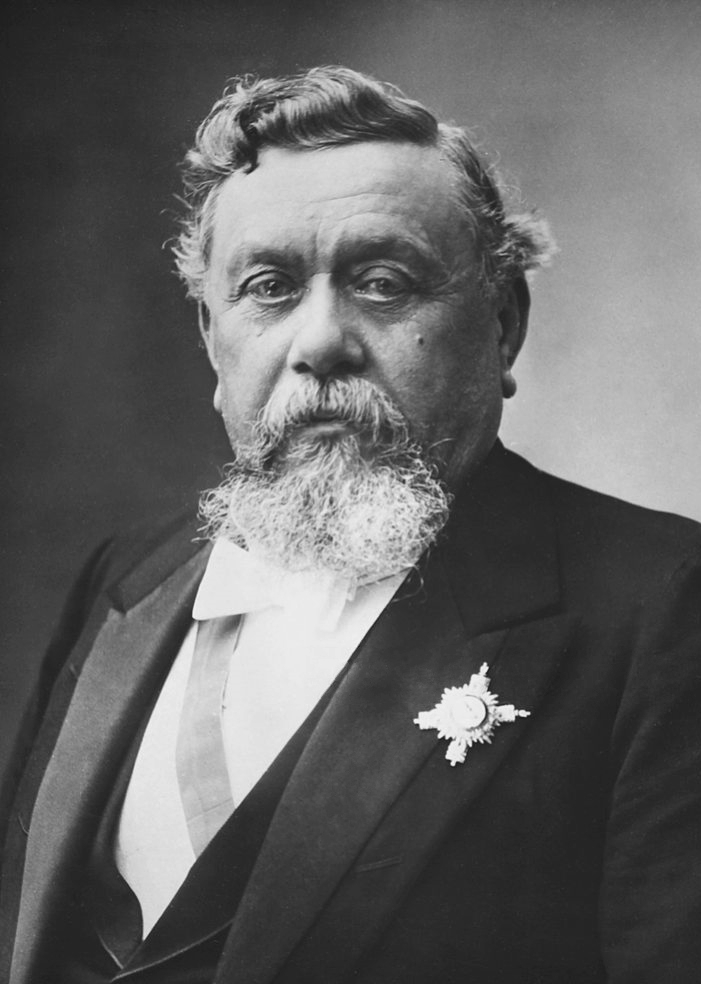 Armand Fallières in Paris